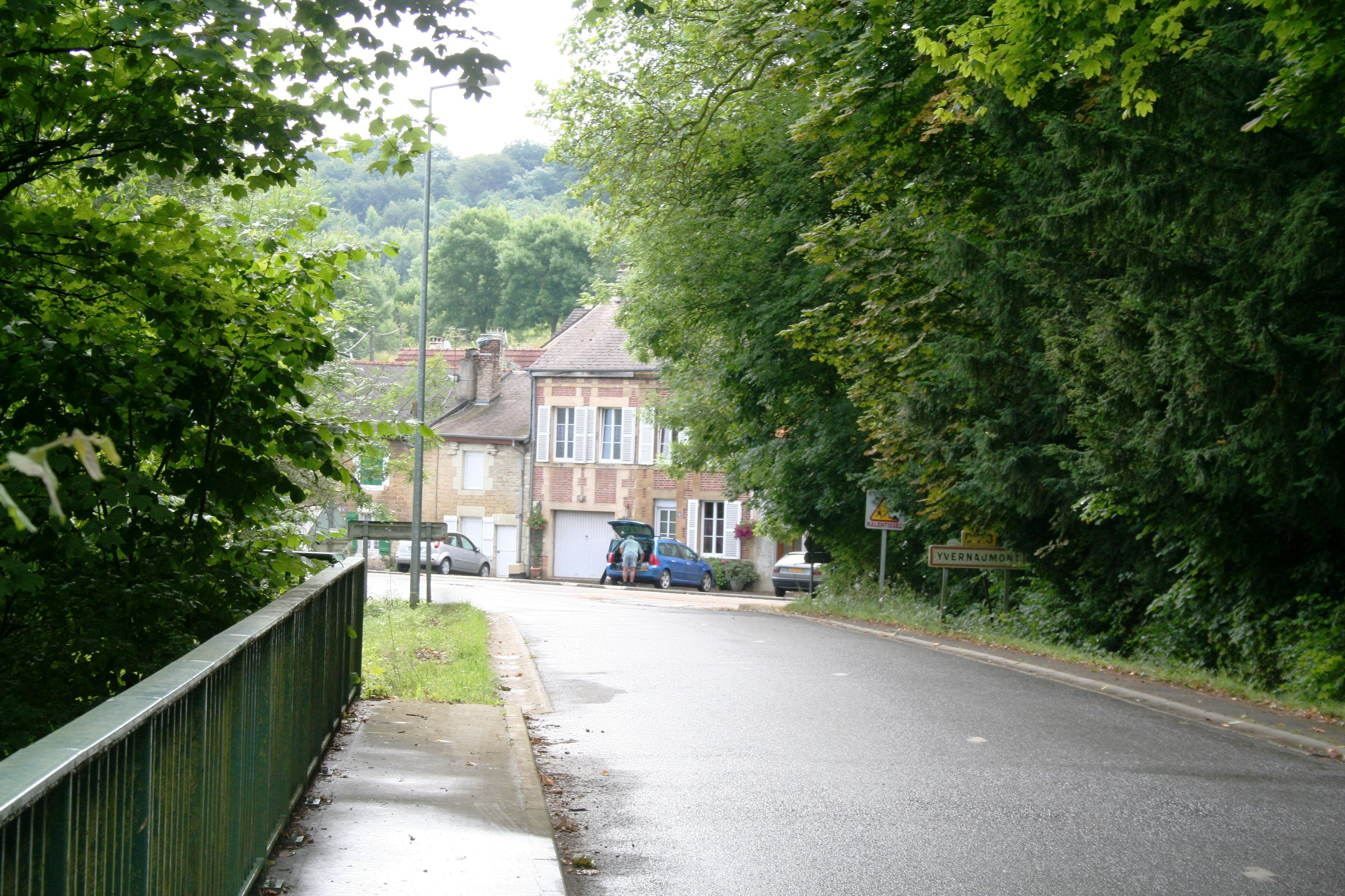 Village Ardennais